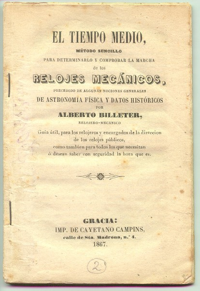 Portada del llibret de Billeter publicat el 1867